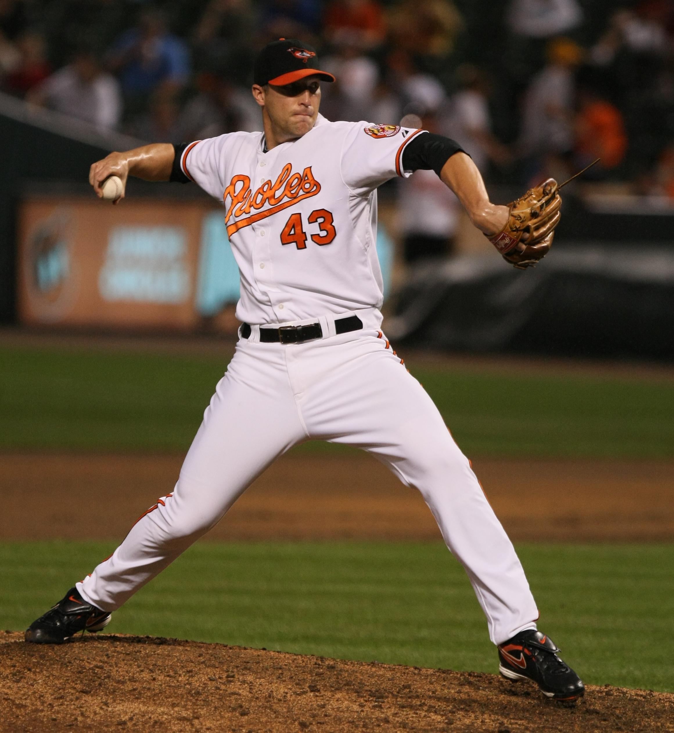 Jim Johnson